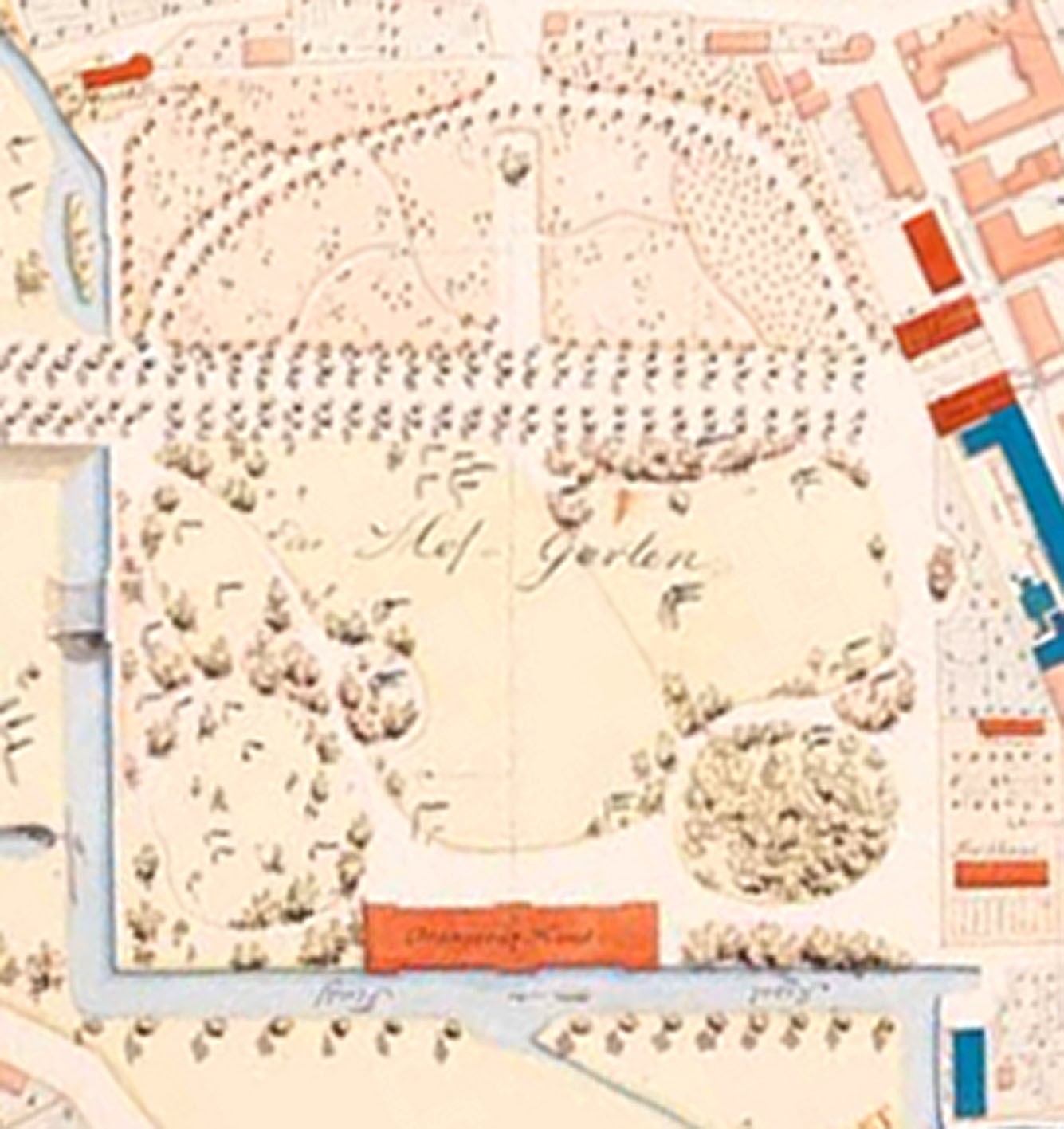 Teilansicht des Hofgartens mit Orangeriegebäude, Stadtplan der Stadt Ansbach, 1808 - 1812 (Ausschnitt)